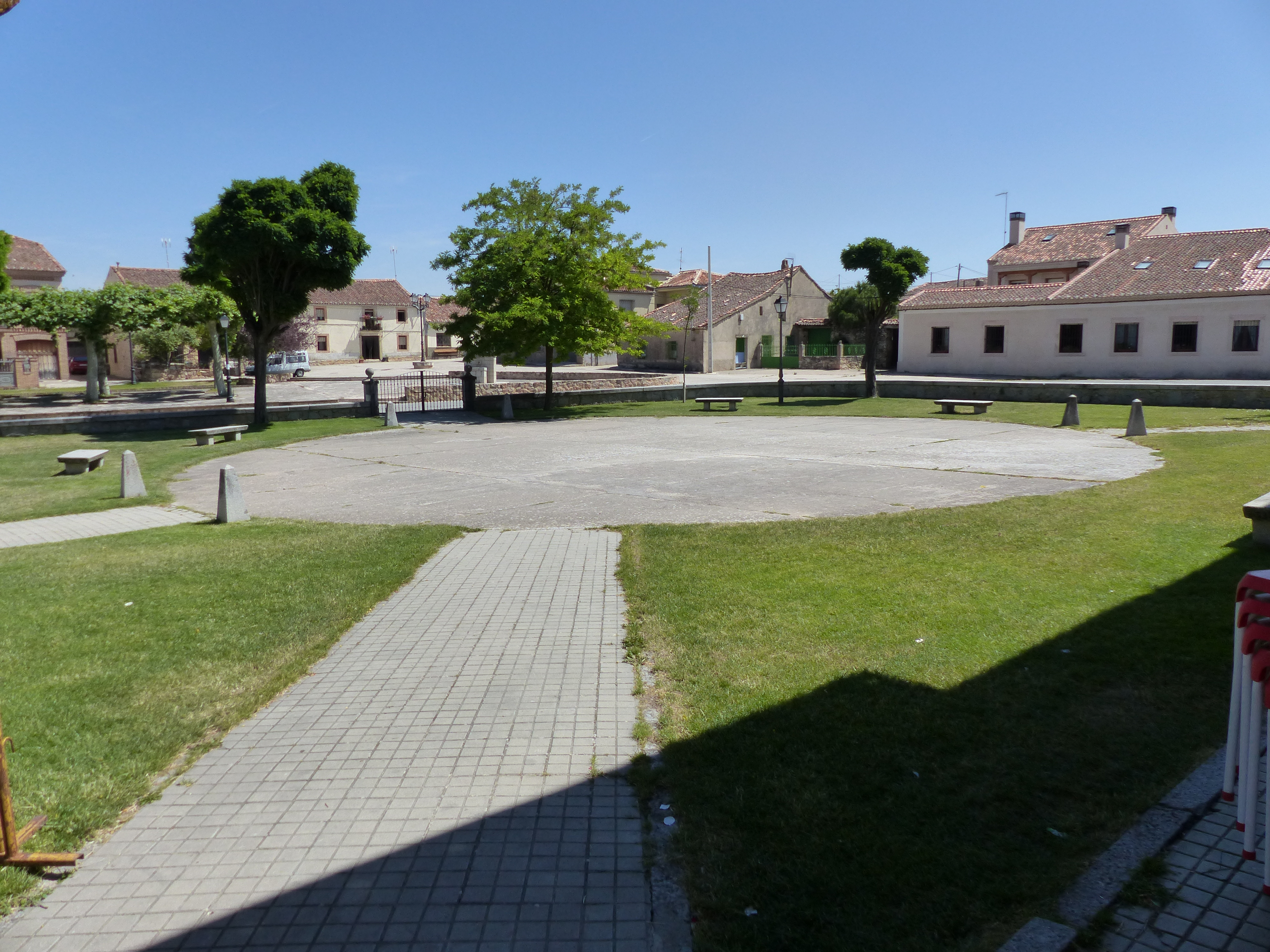 La Matilla, Segovia.